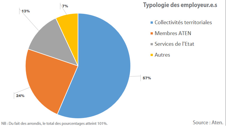 Typologie simplifiée des employeurs en France en 2013 selon l'Aten ; et d'après SOeS ; INSEE, ESANE, et comptes nationaux base 2010, donnée environnementale extraite d'un rapport du CESE (Conseil économique, social et environnemental) publié en 2016 et intitulé Contribution des "emplois de la biodiversité" à la transition écologique de 130 pages, paru en 2016 (Rapport complet, PDF) ; rem : le rapport 2016 du comité de filière biodiversité et services écologiques note que « la définition du SOeS ne se veut pas exhaustive : elle ne permet pas d'’observer les emplois de la recherche dans le domaine de la biodiversité et des services écologiques, car ceux-ci ne sont pas distingués par domaine. Il ne serait pas absurde non plus de comptabiliser des métiers aussi différents que les professionnels des zoos travaillant à des programmes de maintien et enforcement d’espèces en voie de disparition, les agents des douanes chargés de la répression des trafics d’espèces protégées, les juristes spécialisés, les professionnels dans certaines grandes entreprises comme les sociétés d’autoroute qui ont développé un service pour la gestion de milliers d’hectares, certains techniciens cynégétiques en charge de la protection de certaines espèces, etc.« Il n’est donc pas absurde de considérer que le secteur de la biodiversité et des services écologiques mobilise au moins 20 000 professionnels aujourd’hui en France. »